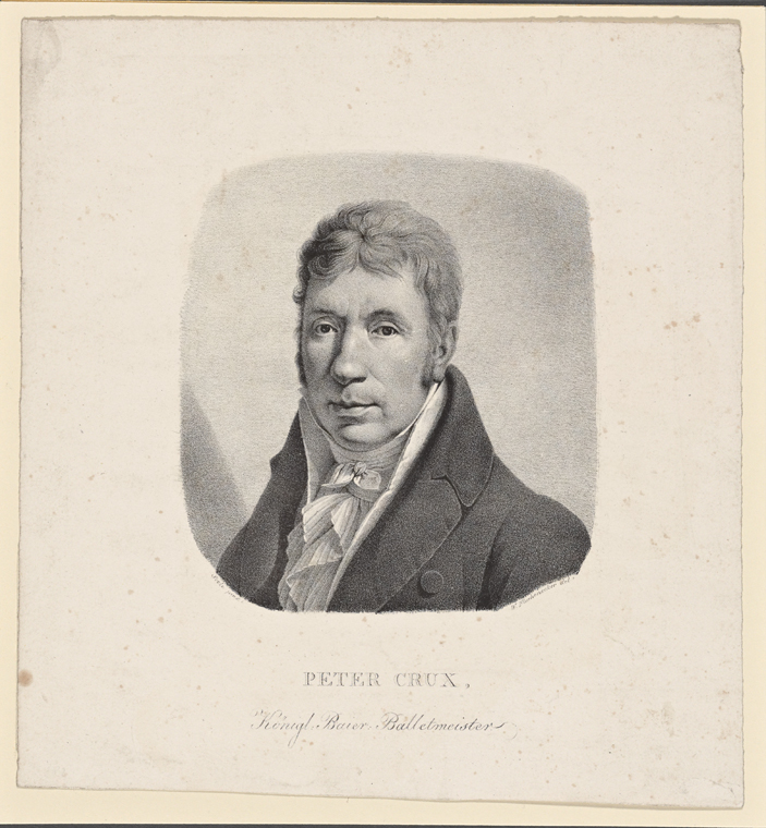 Peter Crux, königl. bayer. Ballettmeister